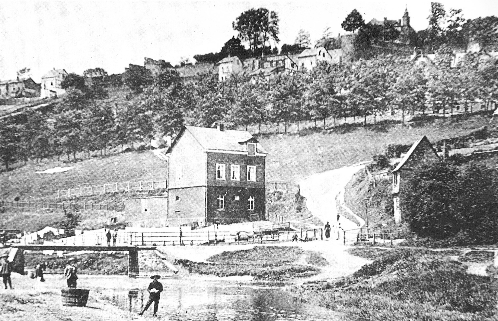 Siegen/Westfalen: Der Ortsteil Hain am Osthang des Siegbergs auf einem Foto von 1909, Ansicht von Nordosten. Im Vordergrund der Fluss Weiß, Mitte rechts der Weg Am jähen Hain. Oben rechts das Obere Schloss mit Wehrturm Sackturm und Schlossmauer